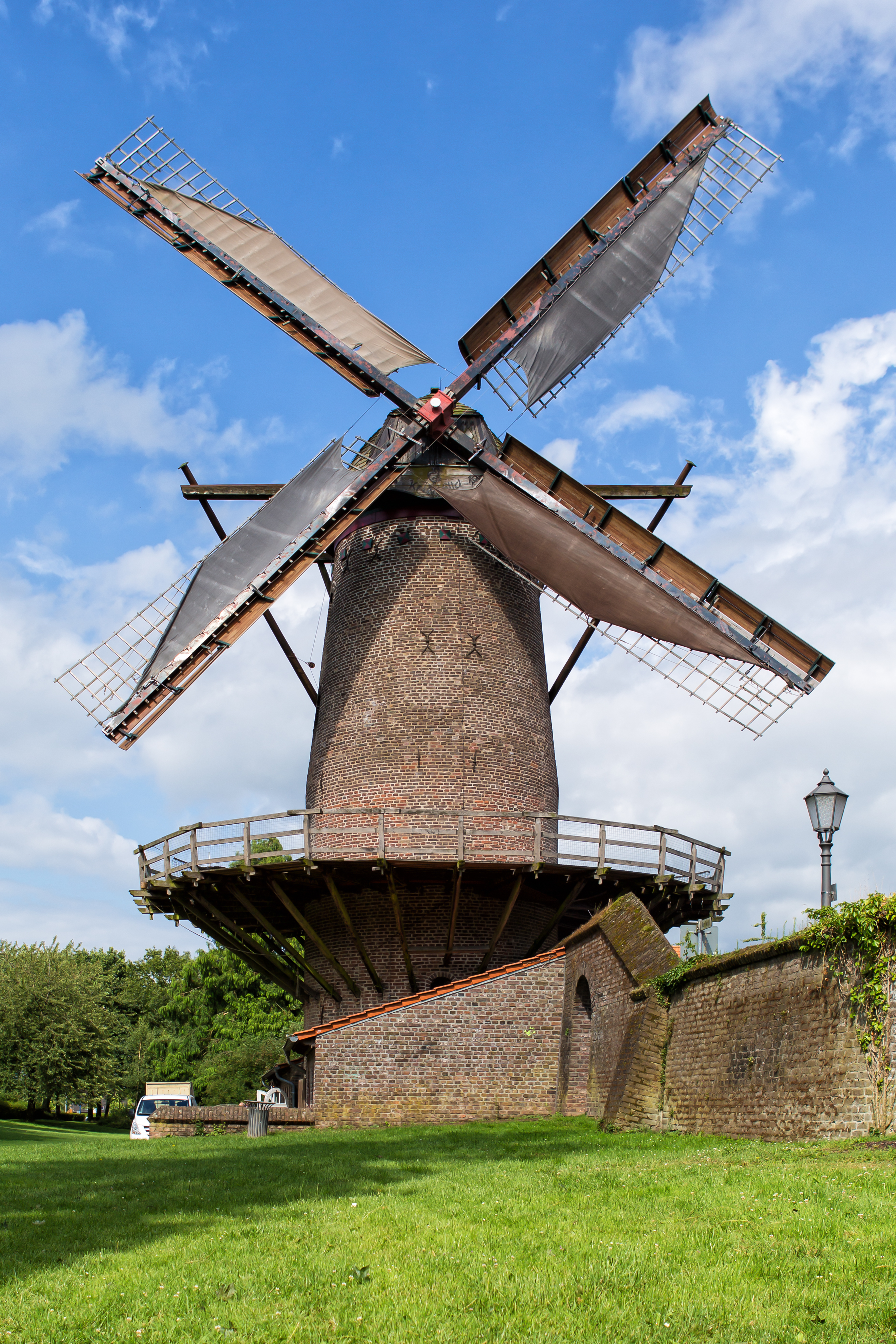 Xanten - Kriemhildmühle - 2015